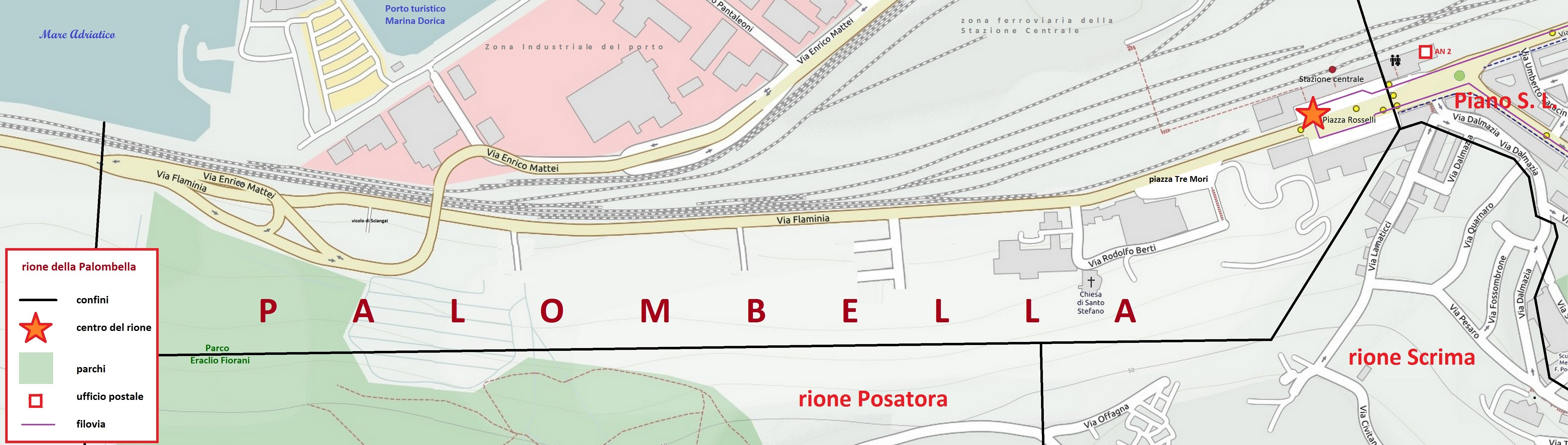 Mappa del Rione della Palombella di Ancona, con i confini, le vie, le piazze e i parchi.